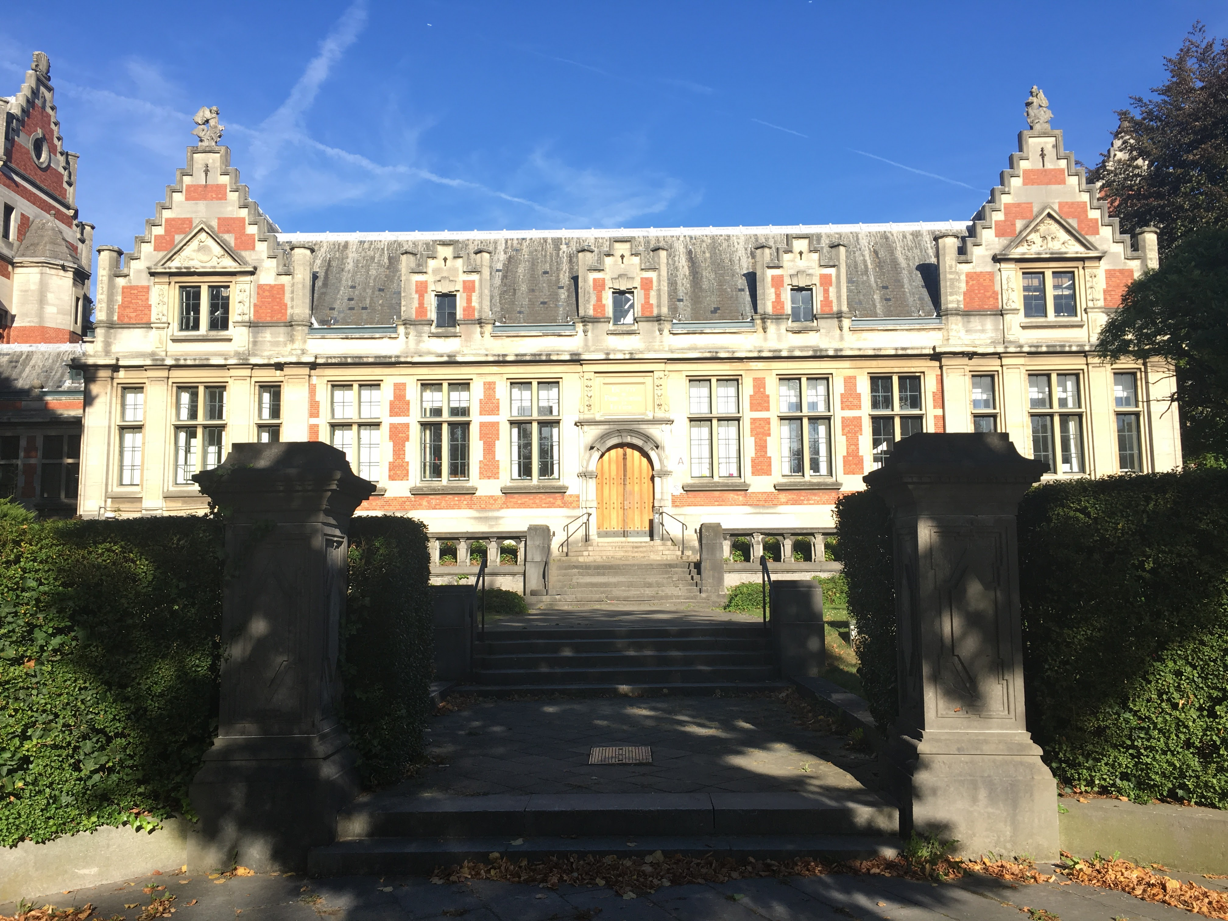 Batiment de la faculte sur le campus de l'ULB